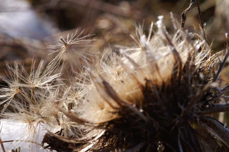 Samenstand der Silberdistel (Carlina acaulis), Lechtalheiden